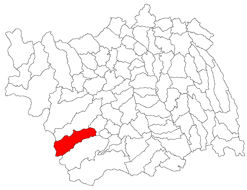 Categorie:Hărţi ale judeţului Bacău